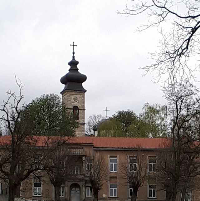 Der Kirchturm der Serbisch-orthodoxen Mariä-Entschlafens-Kirche in der bosnisch-herzegowinischen Stadt Livno.